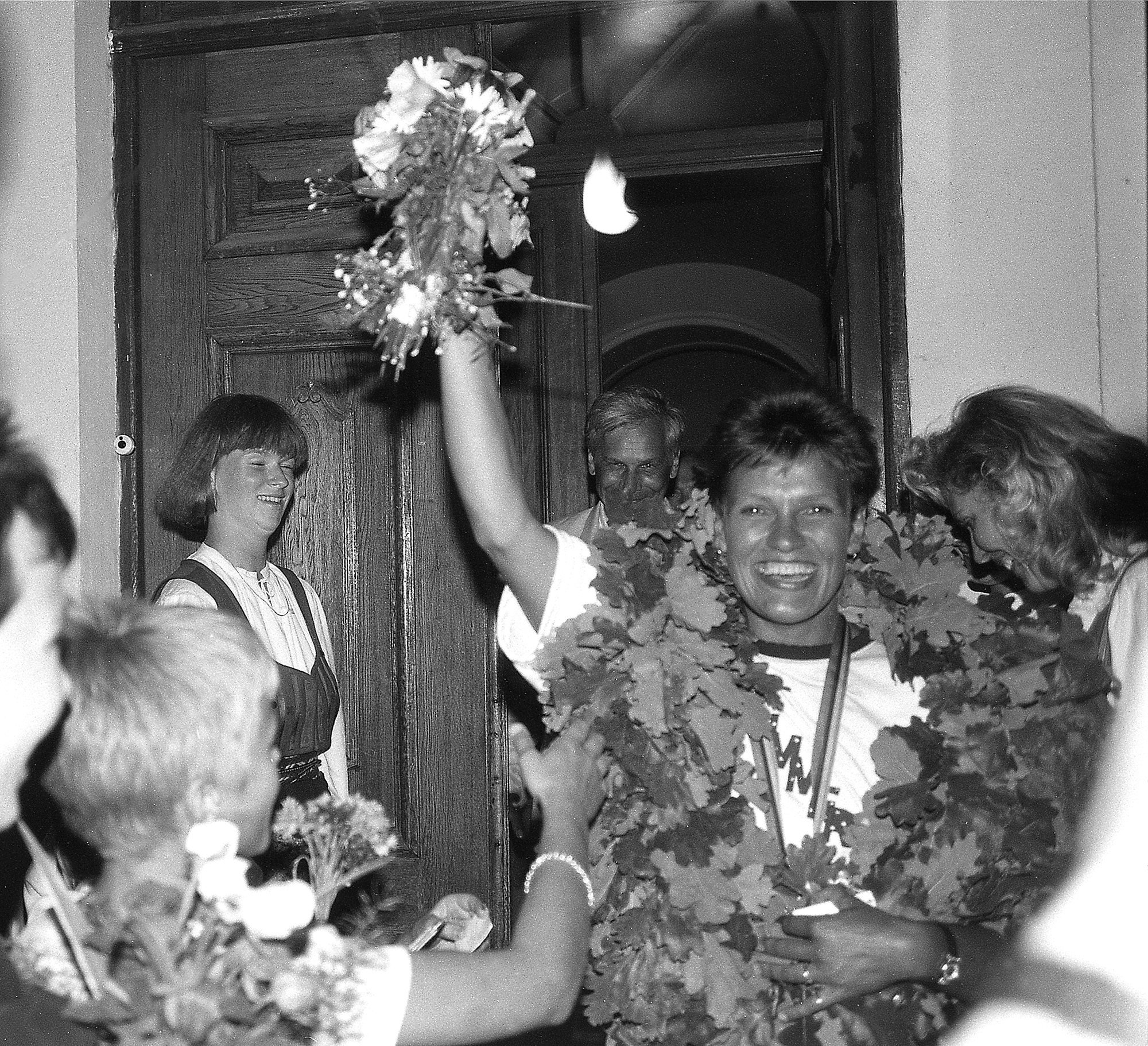 Erika Salumäe vastuvõtt Raekoja platsil 92